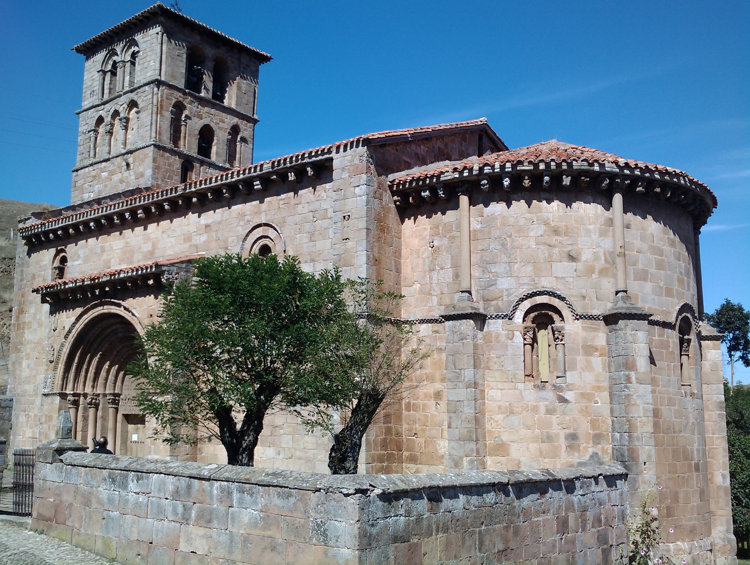 Colegiata de San Pedro de Cervatos